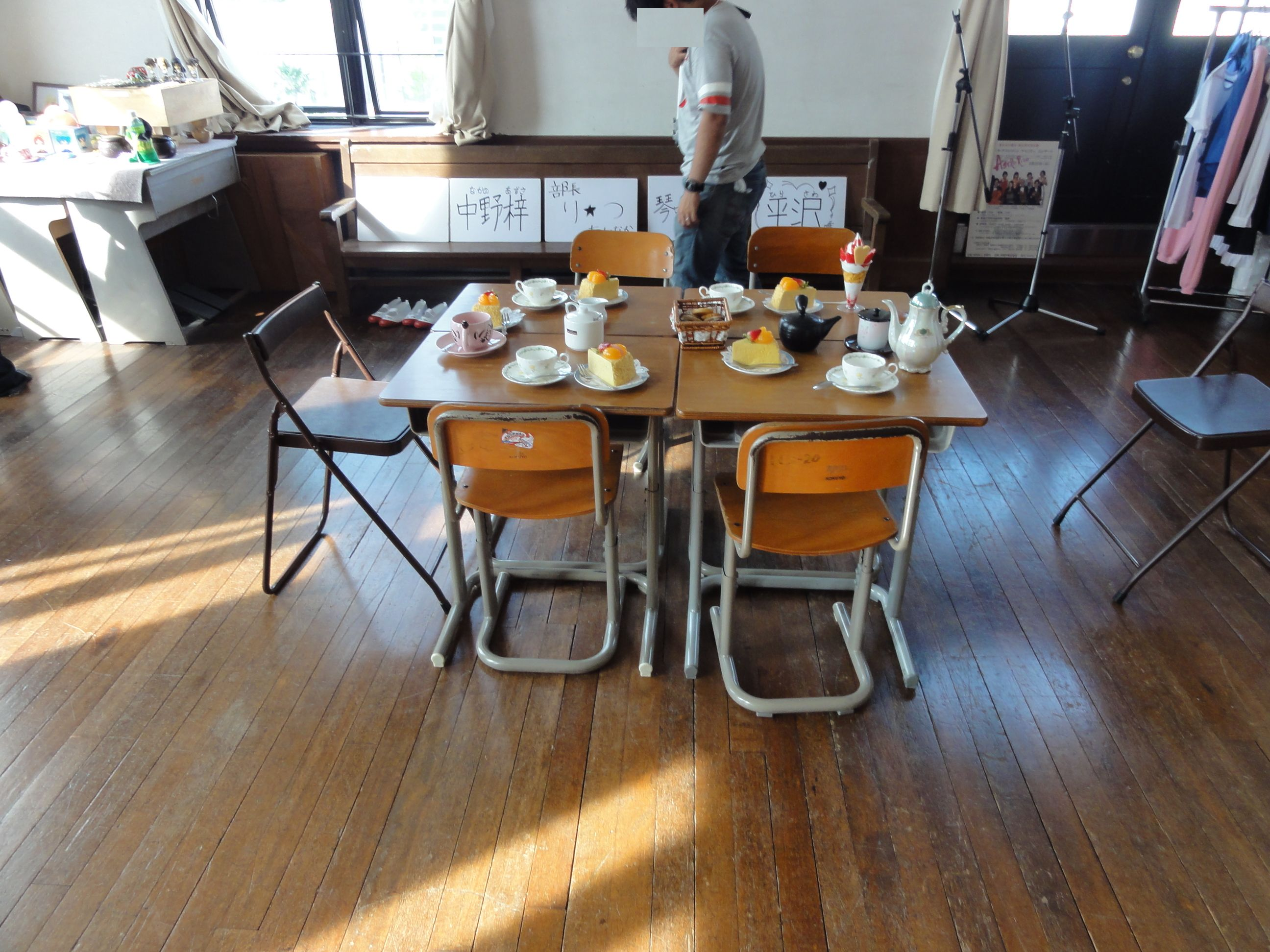 豊郷町立豊郷小学校 旧校舎内 会議室